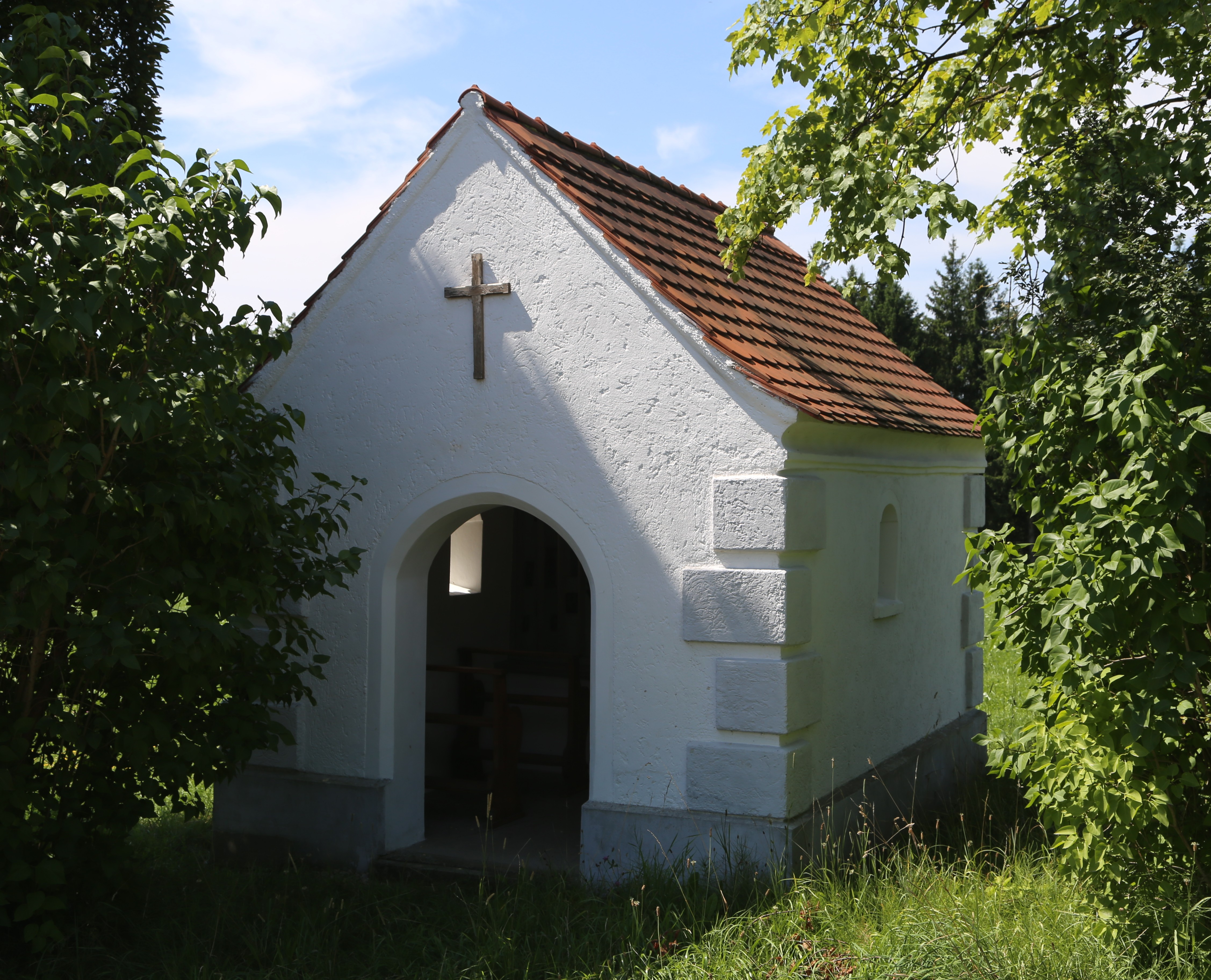 Kapellenfeld, westlich von Mailling, Tuntenhausen; Kapelle, kleiner Saalbau mit Eckrustizierung, 19. Jh.; mit Ausstattung.